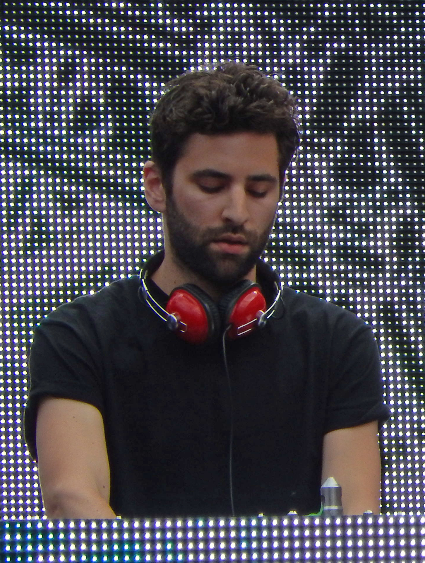 Lane 8